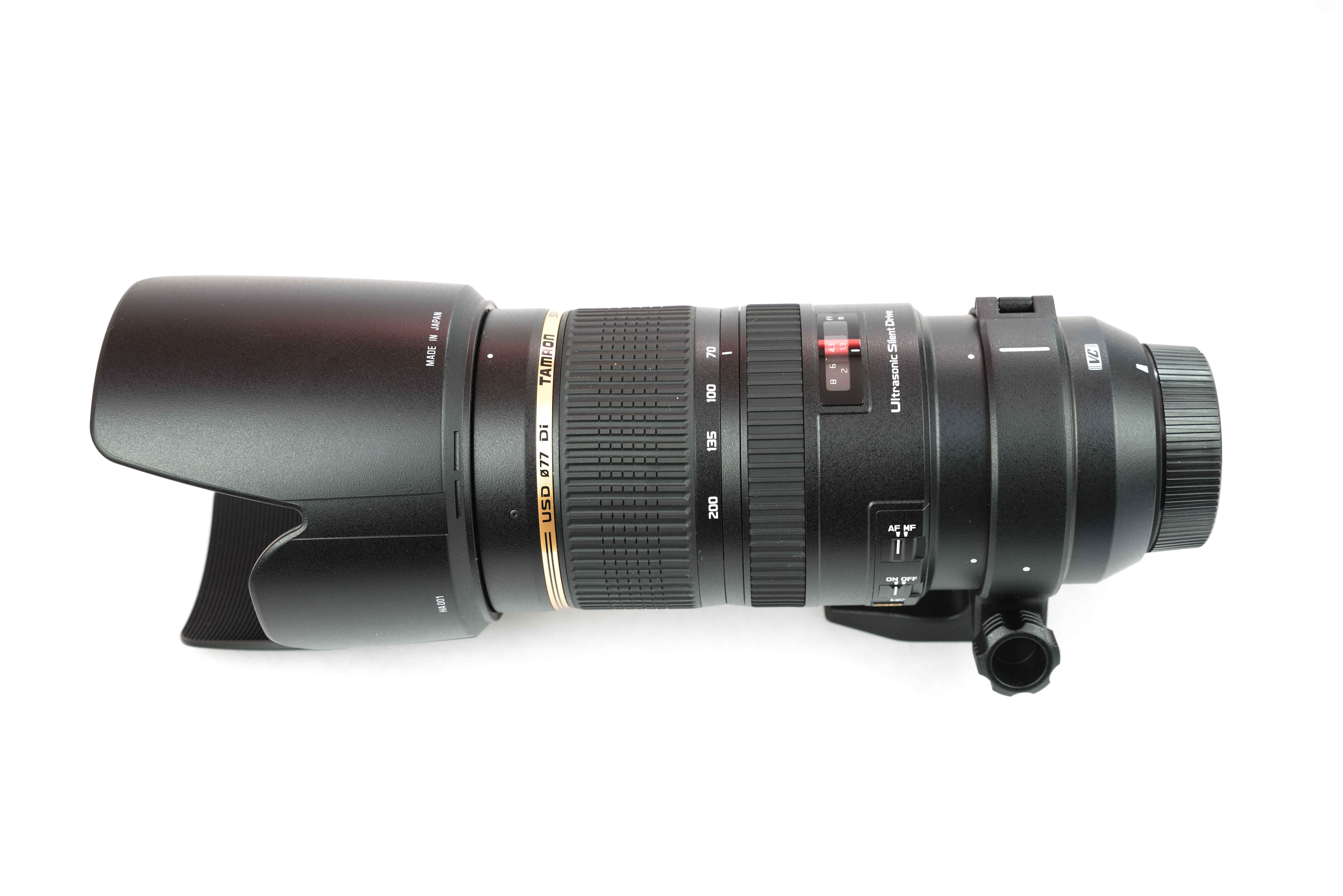 Zoom Tamron SP 70-200 mm f/2,8 DiVC USD monture Nikon, muni de son pare-soleil